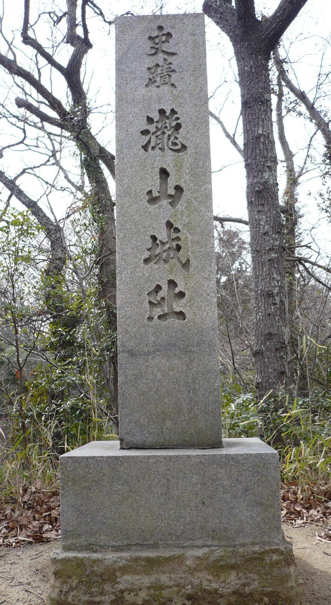 滝山城の石碑